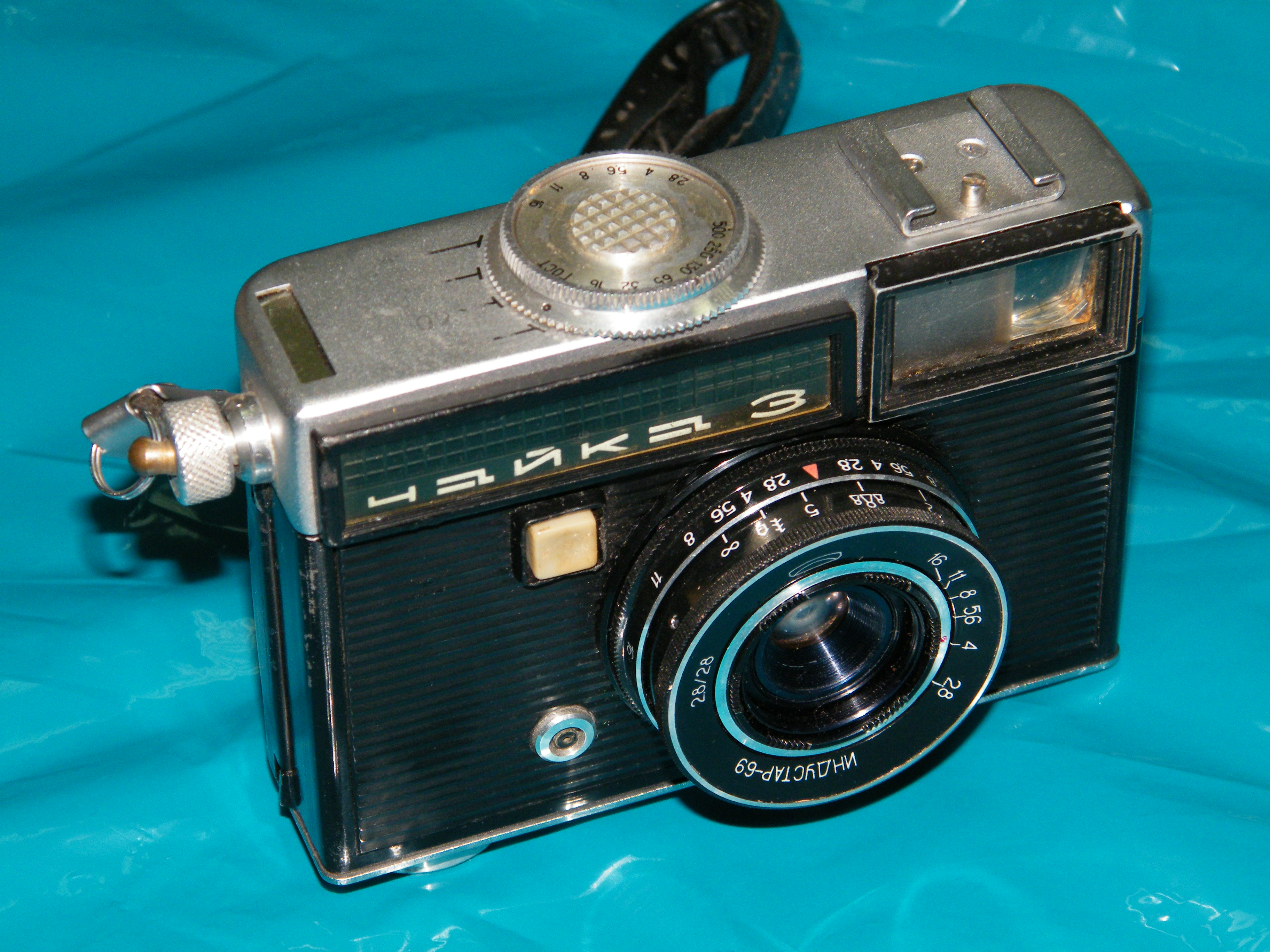 Чайка-3 фотоаппарат БелОМО